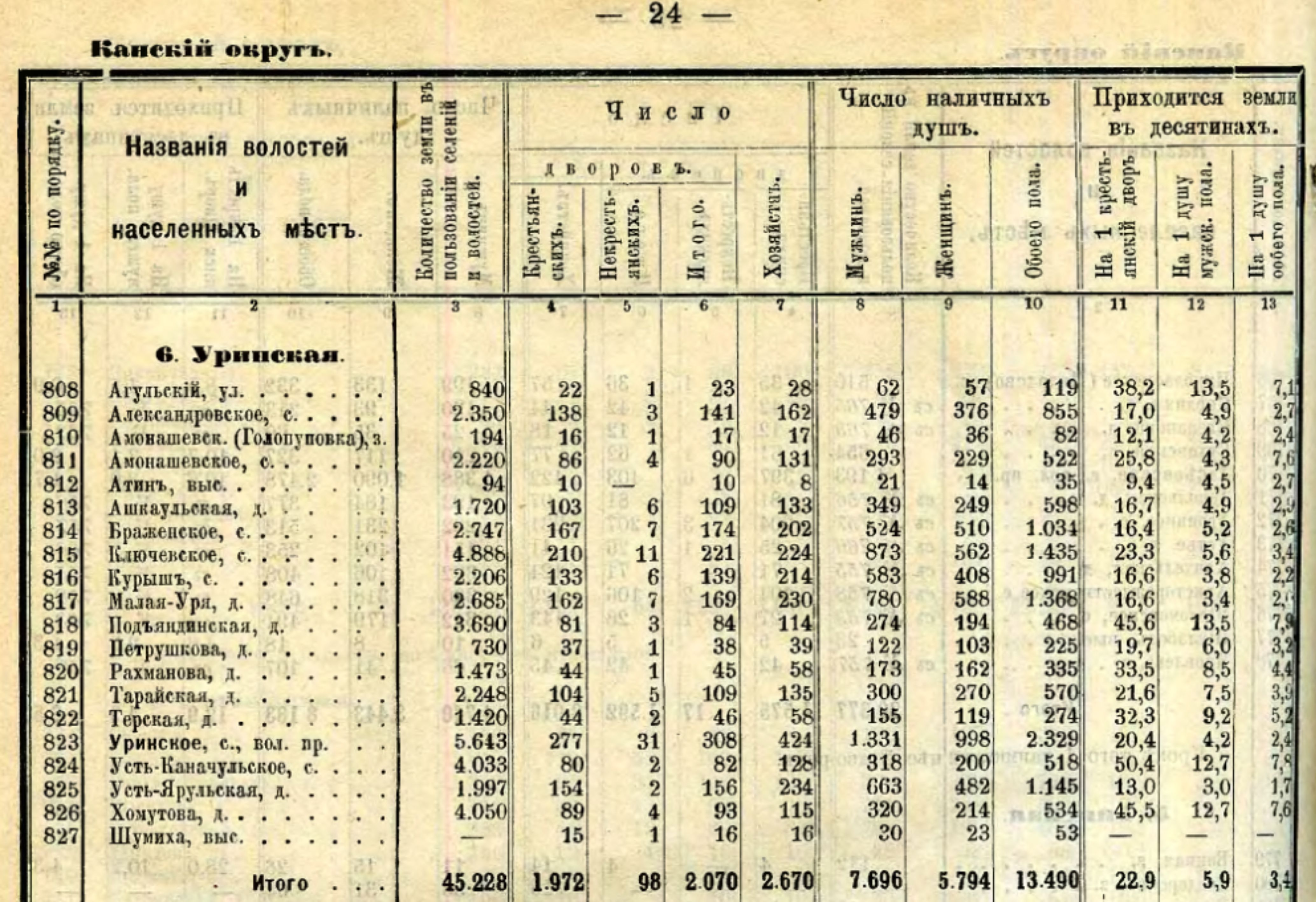 Фрагмент из Статистического сборника 1893 г.